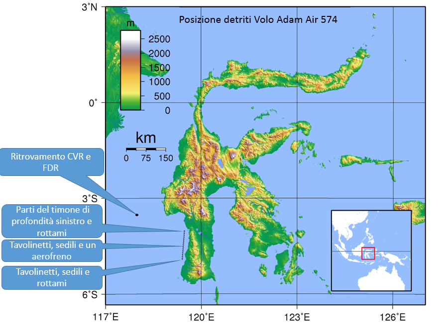 Disposizione Detriti Volo Adam Air 574